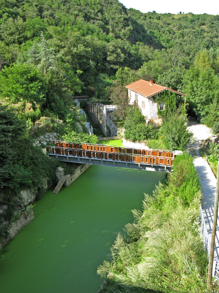 Canal de Givors, (Inscrit, 1995) .